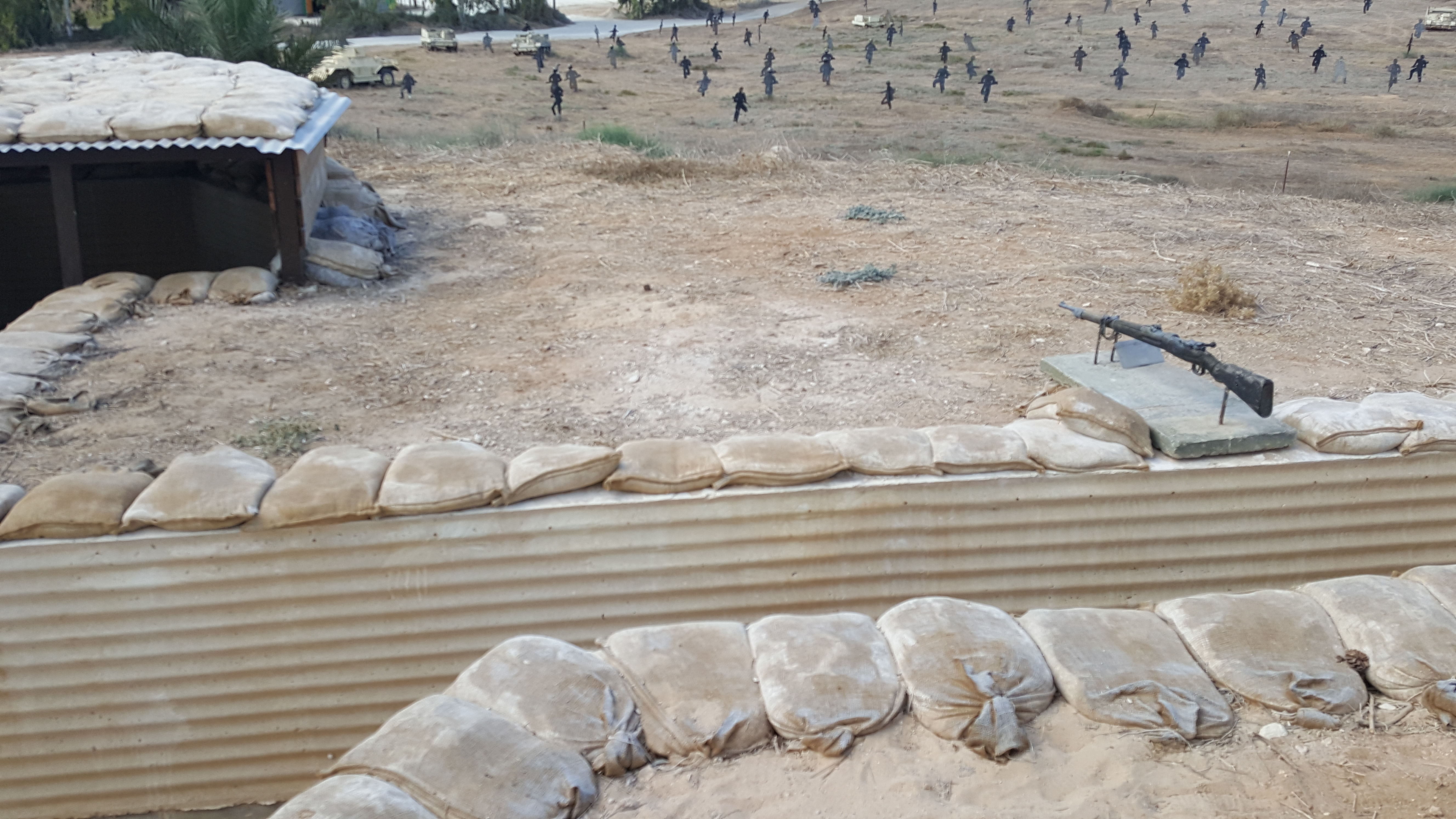 מגדל המים בקיבוץ יד מרדכי